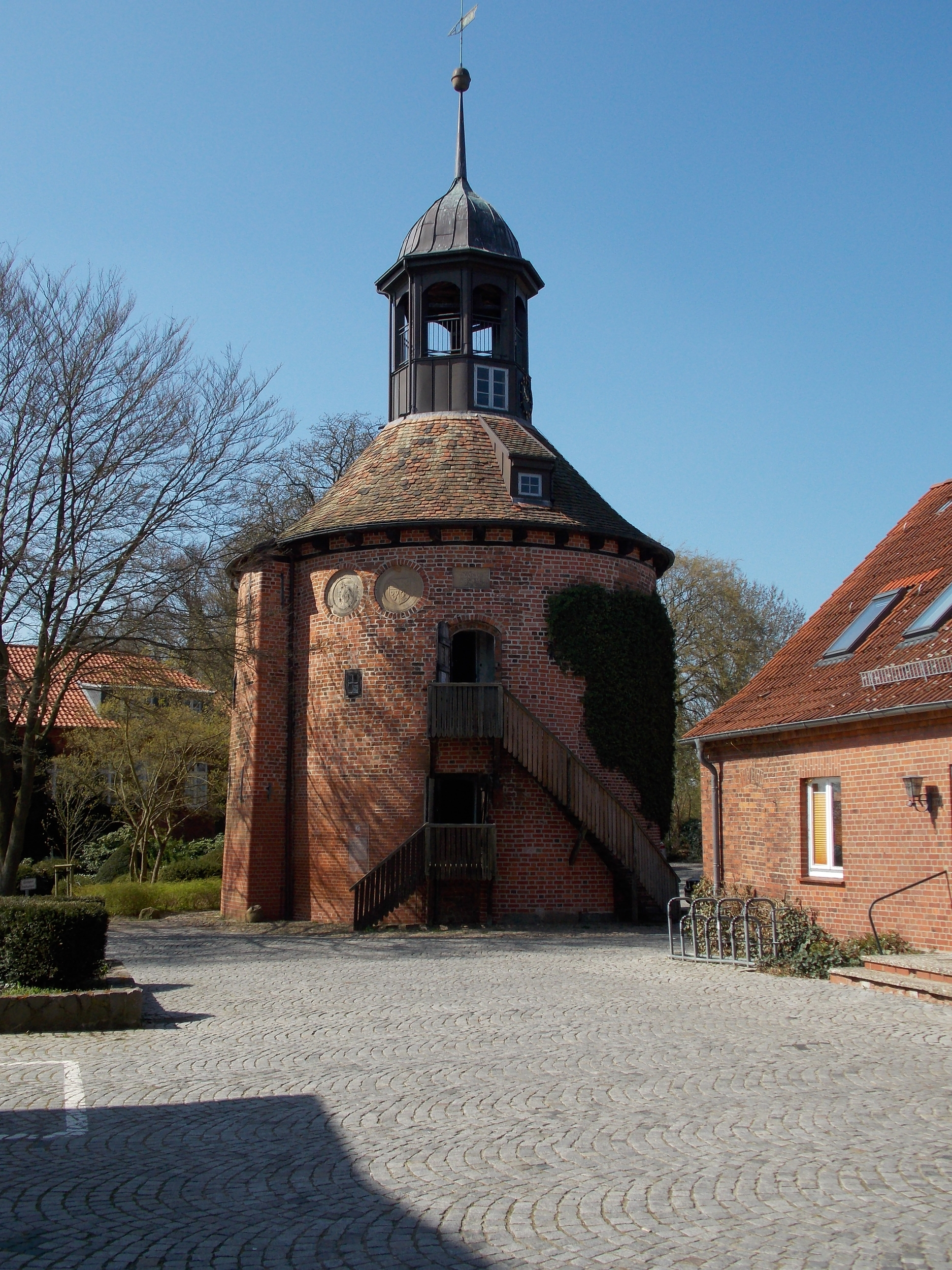 Wehrturm Lauenburg